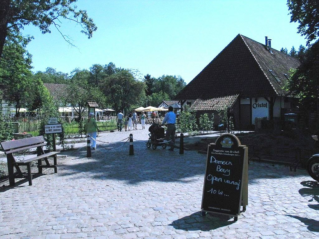 Domein Bovy